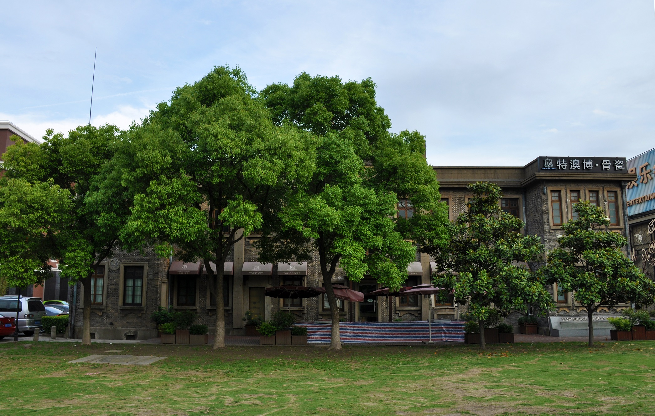 永安第二纱厂高级管理人员写字楼 1921年 国营上海第八棉纺厂医务楼